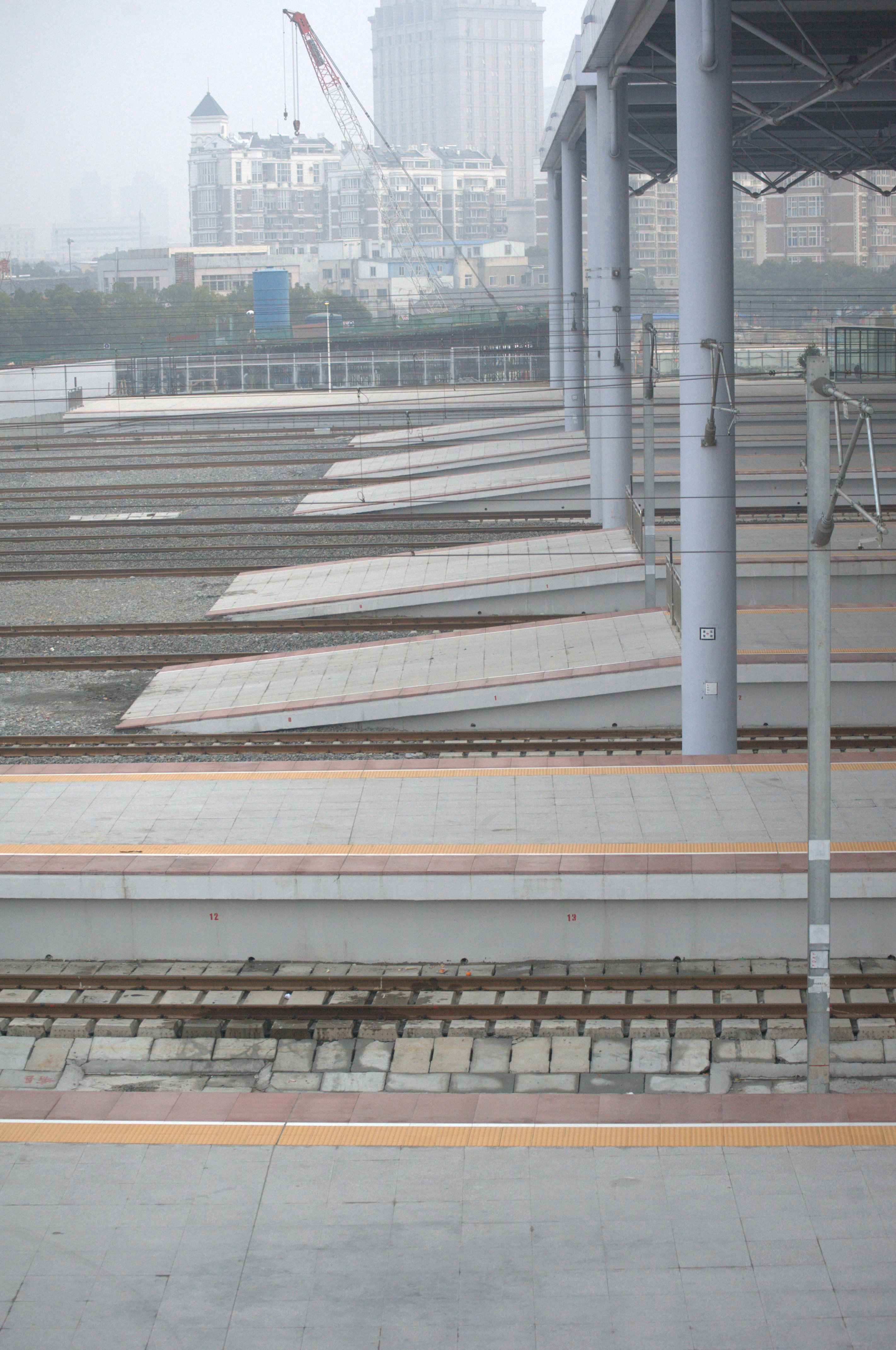 宁波站站台东端